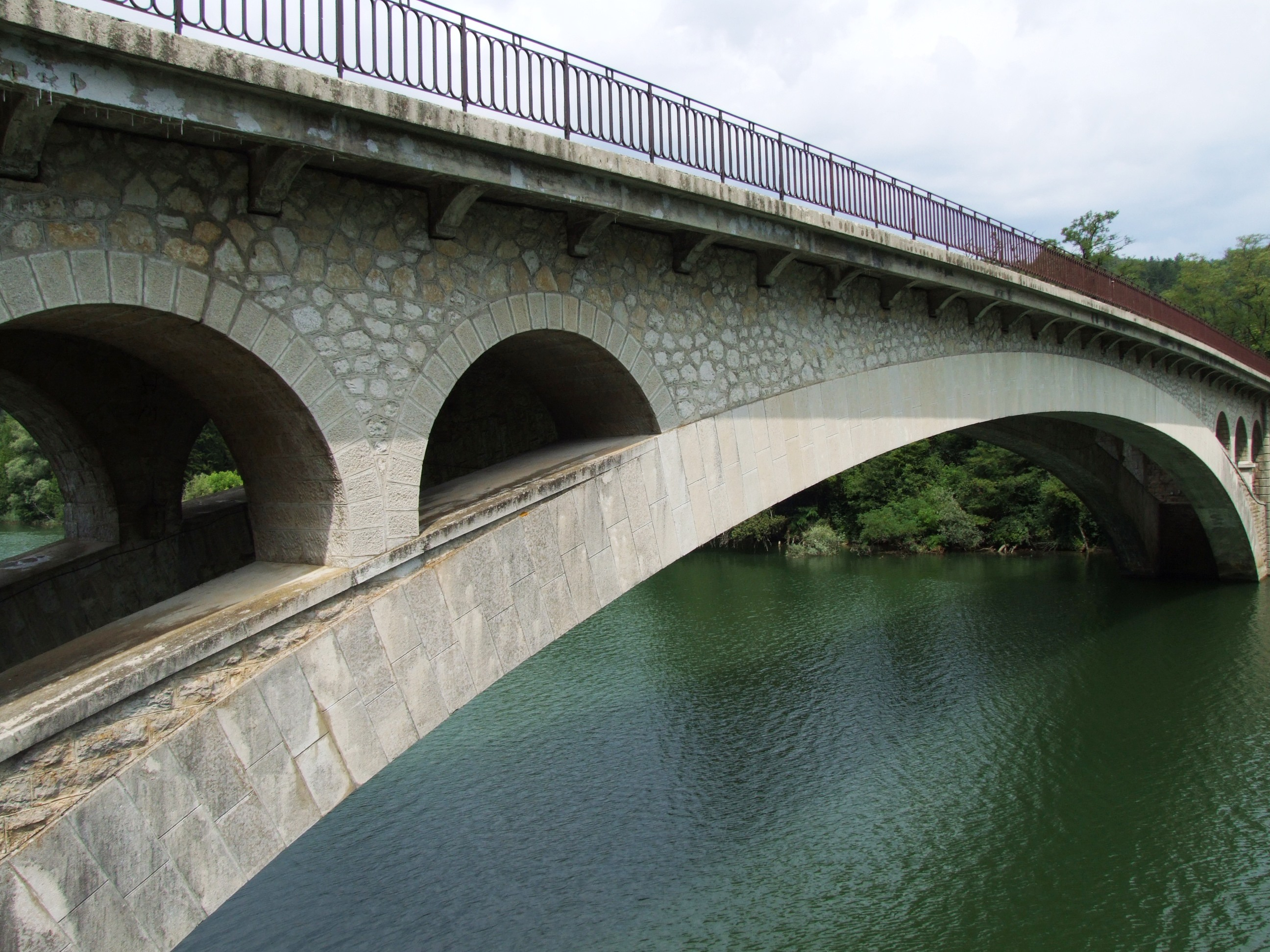 Pont de Thoirette sur l'Ain